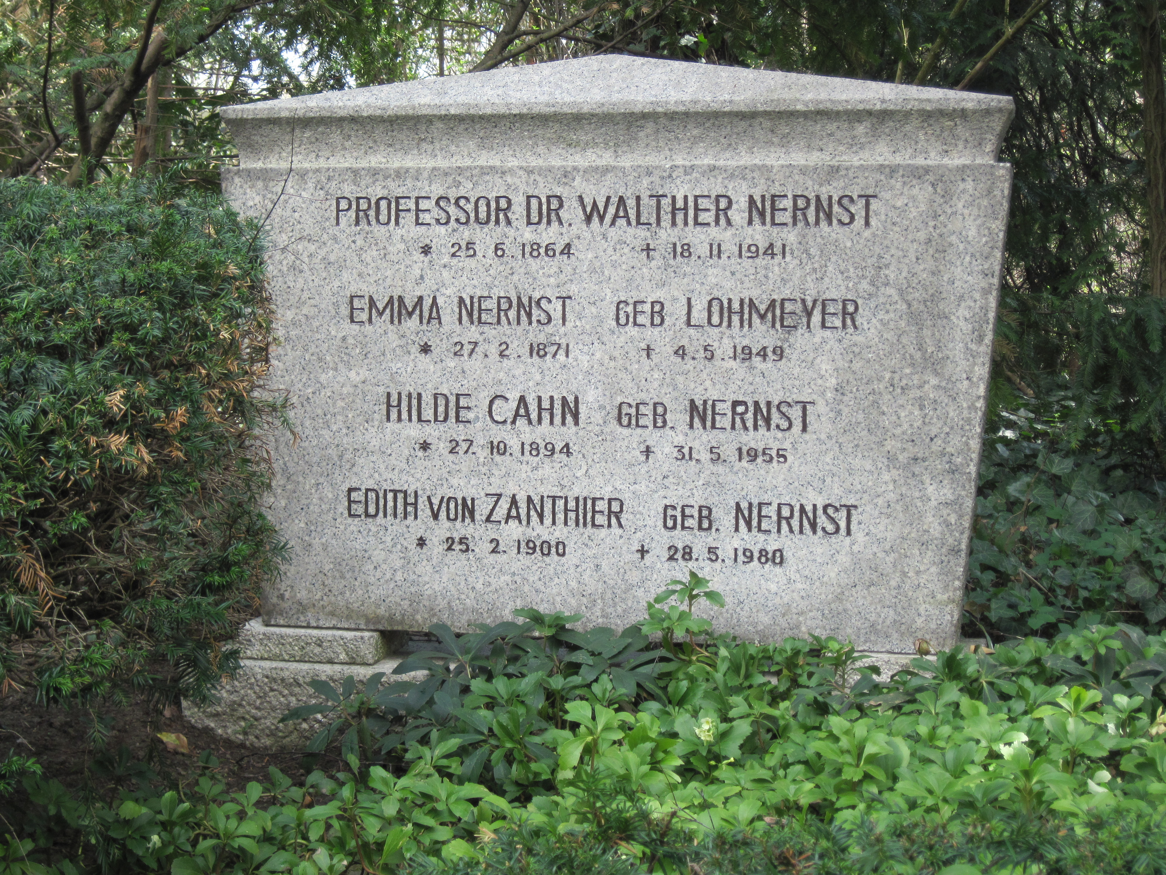 Das Grab von Walther Nernst auf dem Stadtfriedhof in Göttingen